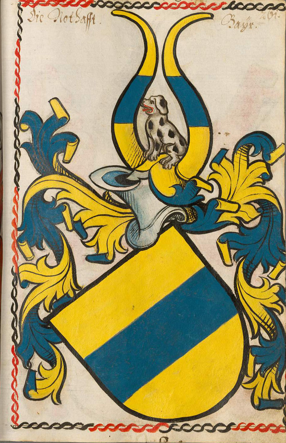 Scheibler'sches Wappenbuch , älterer Teil Bayern Nothafft